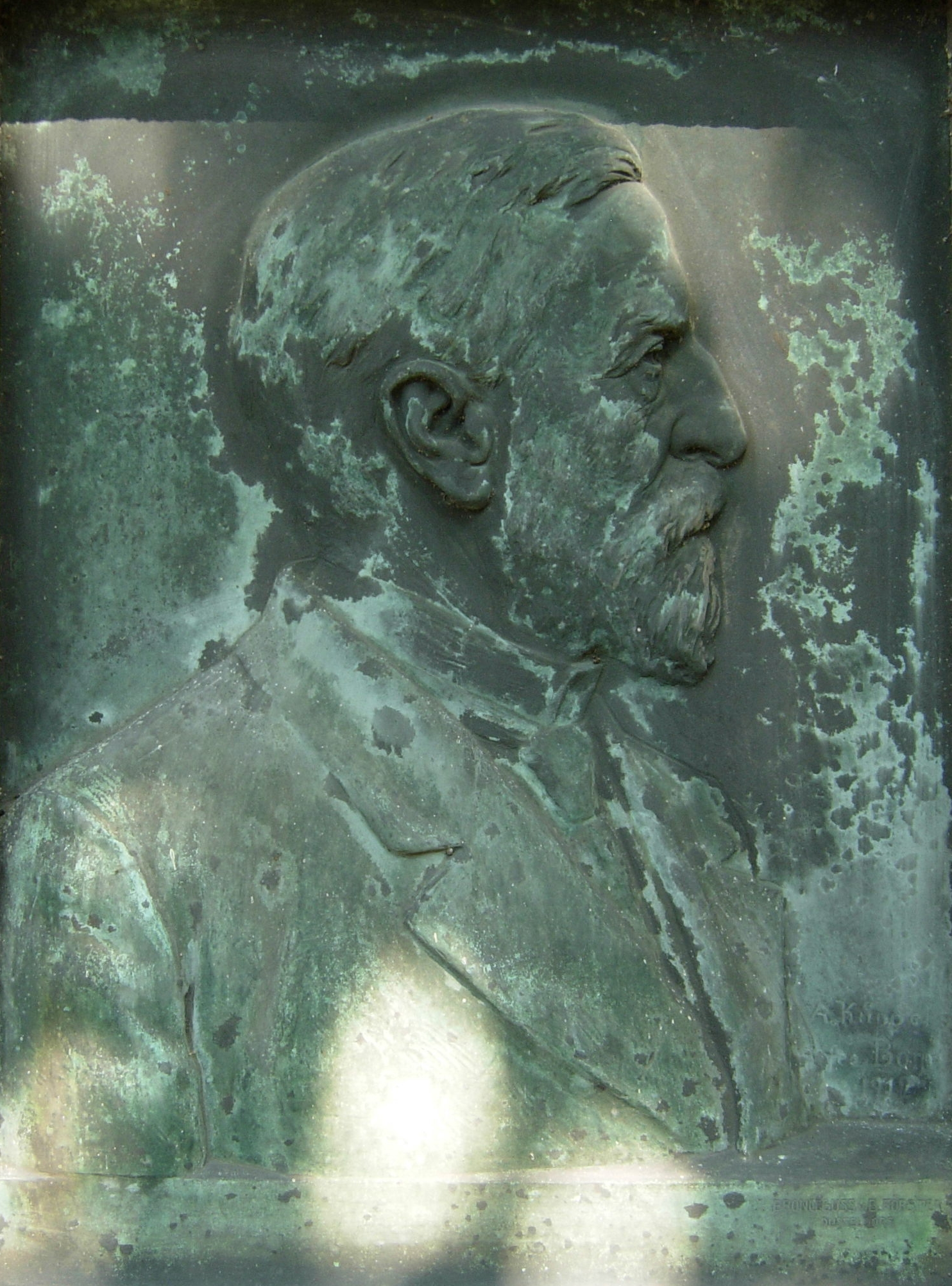 Albert Küppers: Bronzerelief (1912) für den evangelischen Theologen Friedrich E. Sieffert (1843–1911) auf dem Alten Friedhof Bonn; Bronzeguss B. Förster, Düsseldorf